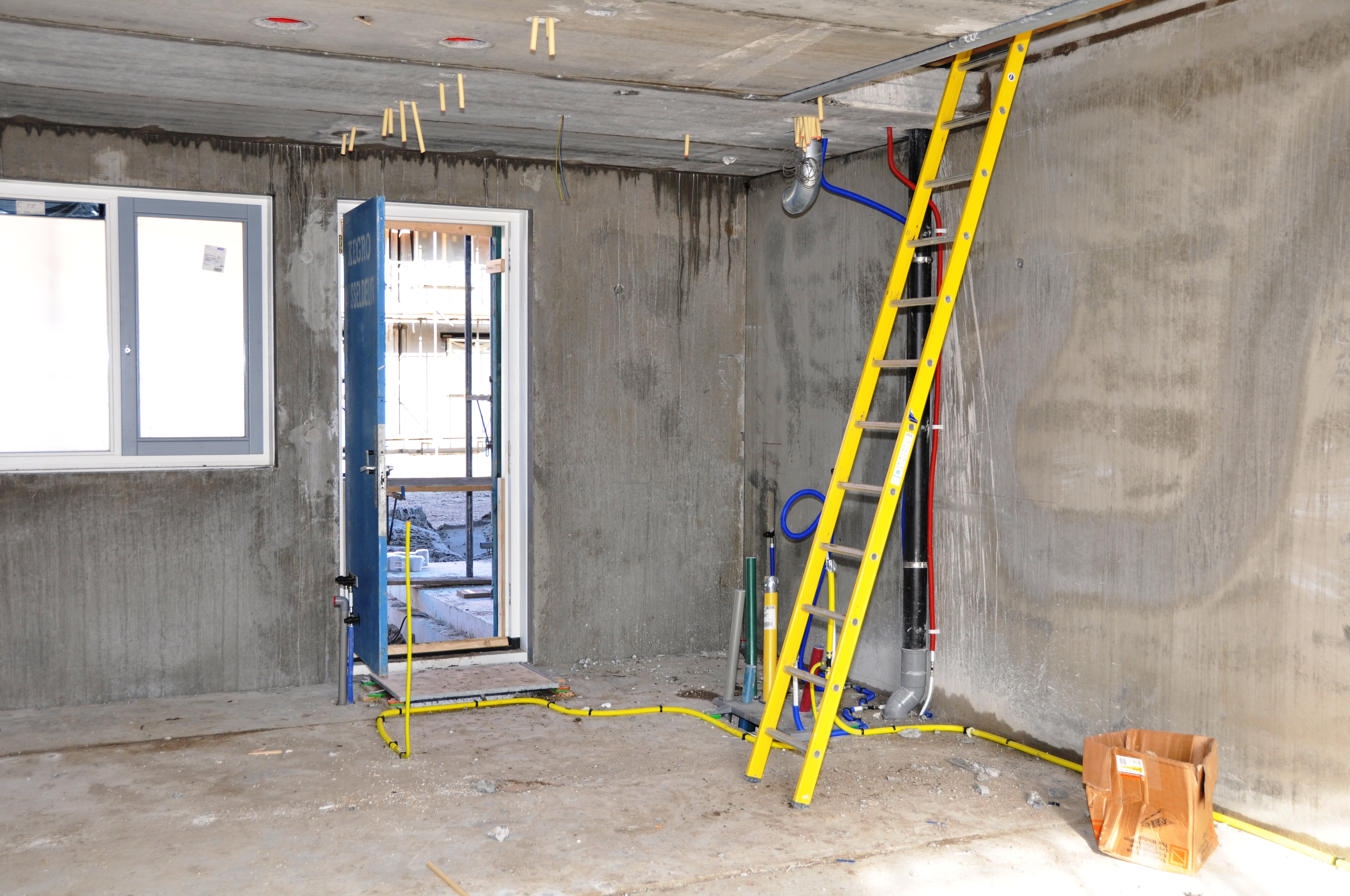 De Oosterscheldestraat (Berkel en Rodenrijs) status 3 februari 2014..